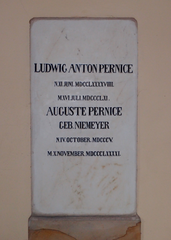 Grab des Rechtswissenschaftlers Ludwig Anton Pernice (1799-1861) auf dem Stadtgottesacker in Halle/Saale.